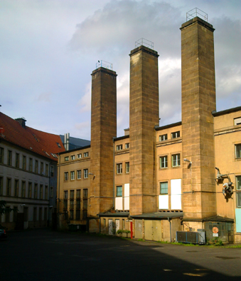 Alte Münze Berlin, ehemals Staatliche Münze der DDR